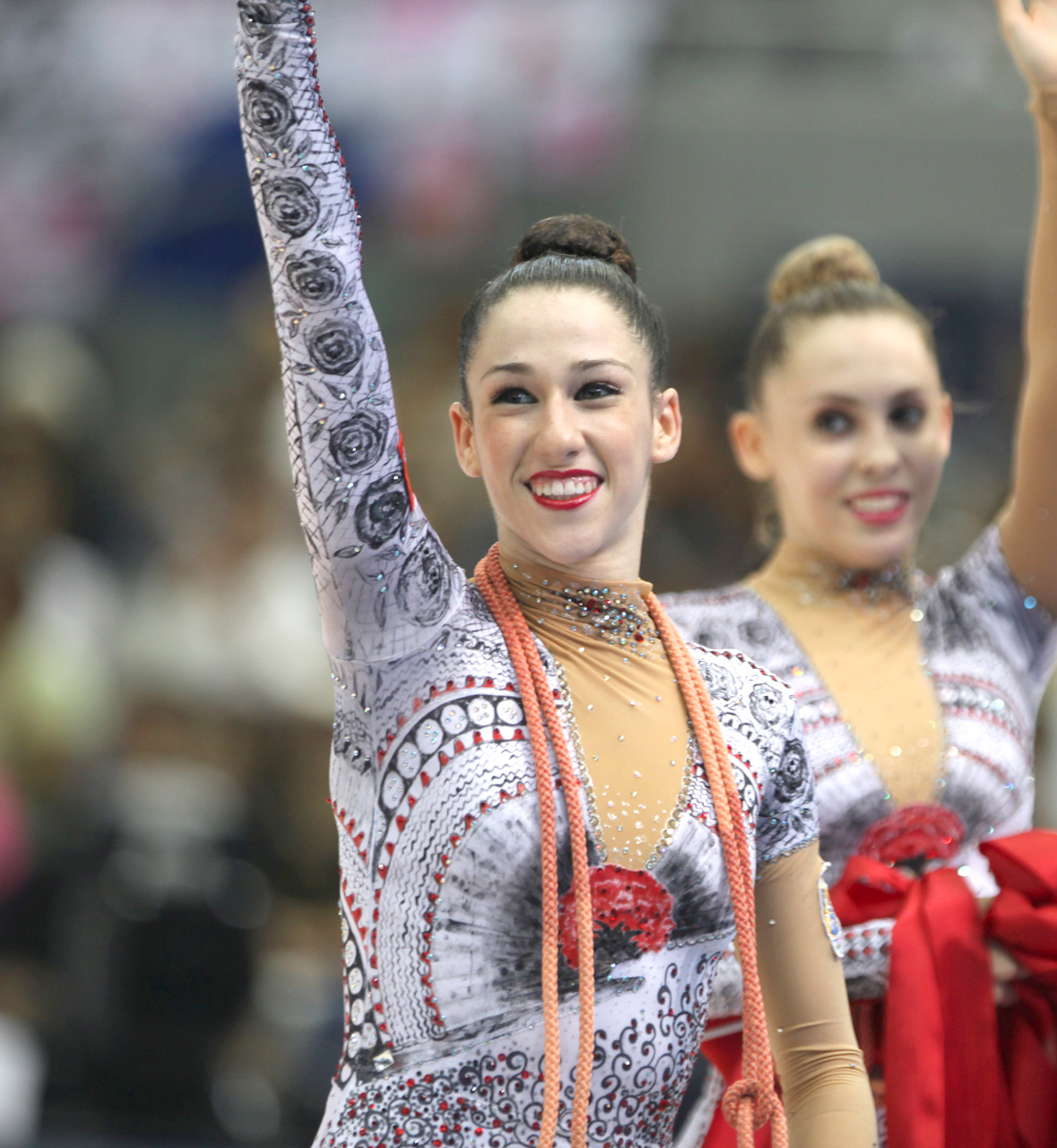 Loreto Achaerandio en el Campeonato Mundial de Mie en 2009.